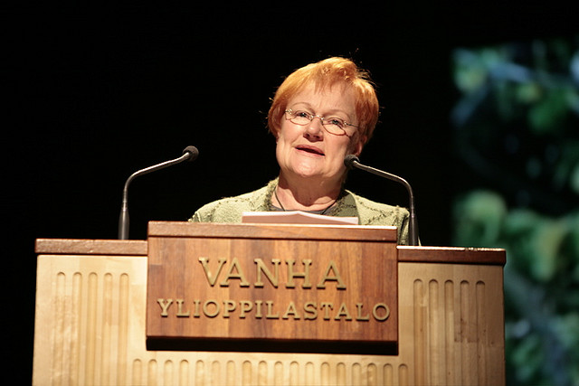 Tarja Halonen